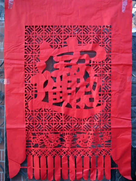 Papier découpé chinois, caractères zhao 招 cai 財 jin 進 bao 寳 combinés formant un sinogramme imaginaire bénéfique.